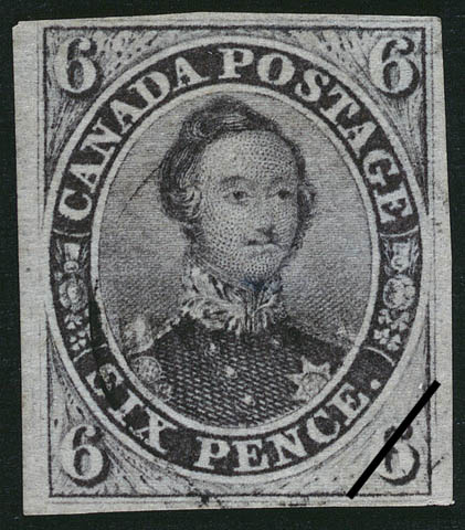 Timbre poste de la province du Canada